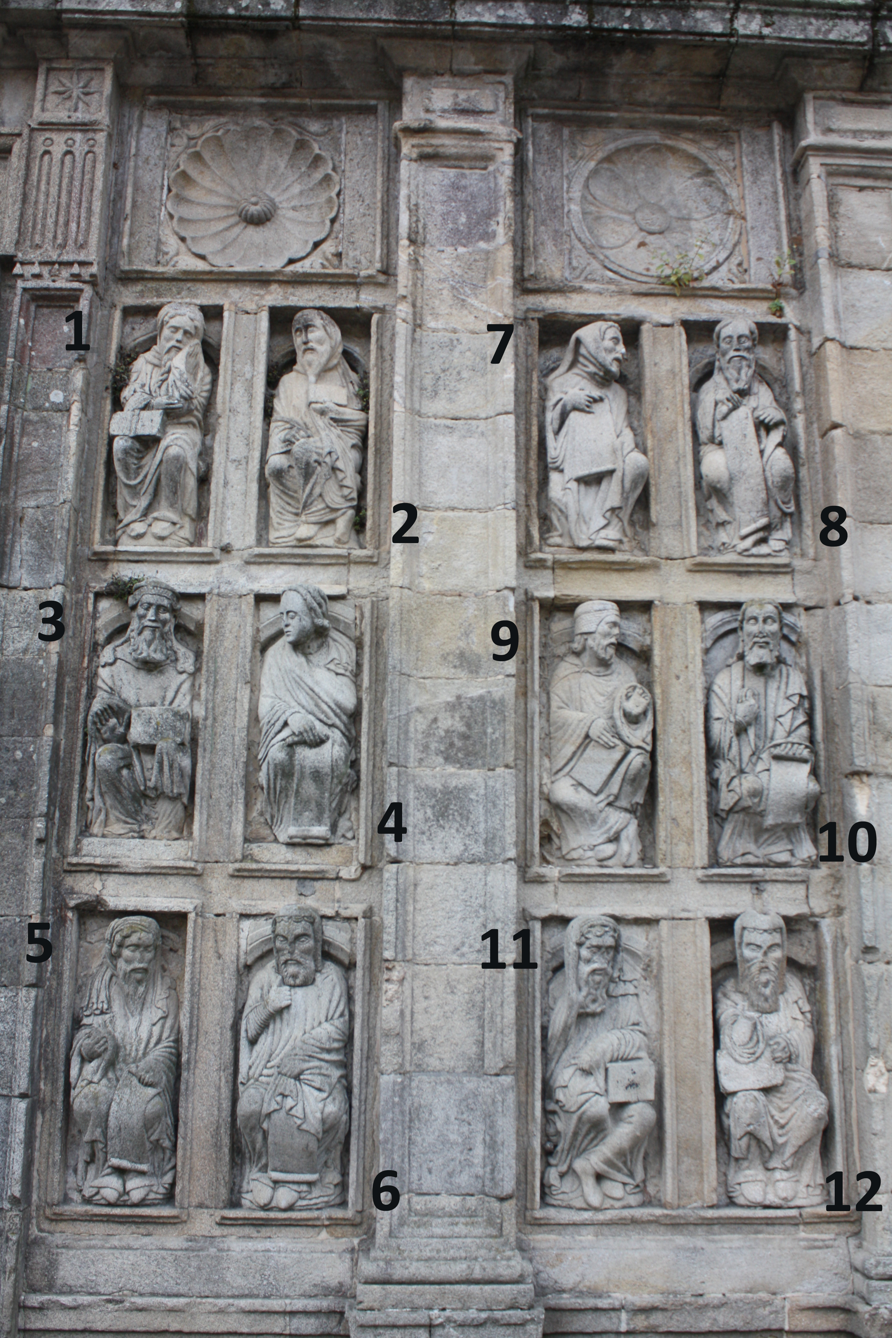 Porta Santa da catedral de Santiago de Compostela (grupo de esculturas á dereita do espectador): 1. profeta Miqueas; 2. profeta Oseas; 3. Samuel; 4. San Filipe apóstolo; 5. profeta Abdías; 6. San Tomé apóstolo; 7. profeta Malaquías; 8. San marcos evanxelista; 9. profeta Xeremías; 10. apóstolo Santiago o Maior; 11. profeta Habacuc; 12. profeta Xonás.